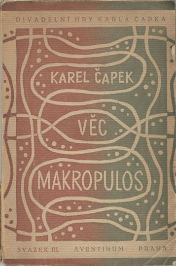 Tvorba Josefa Čapka - obálka knihy